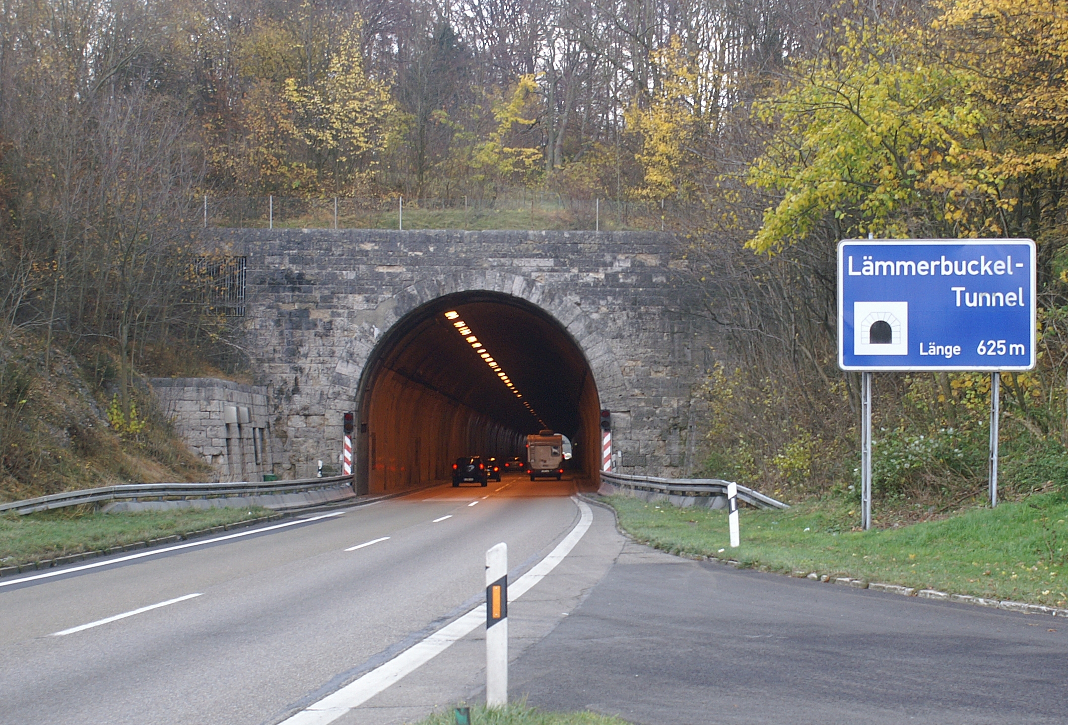 Der Lämmerbuckeltunnel ist einer der ältesten Autobahntunnel.